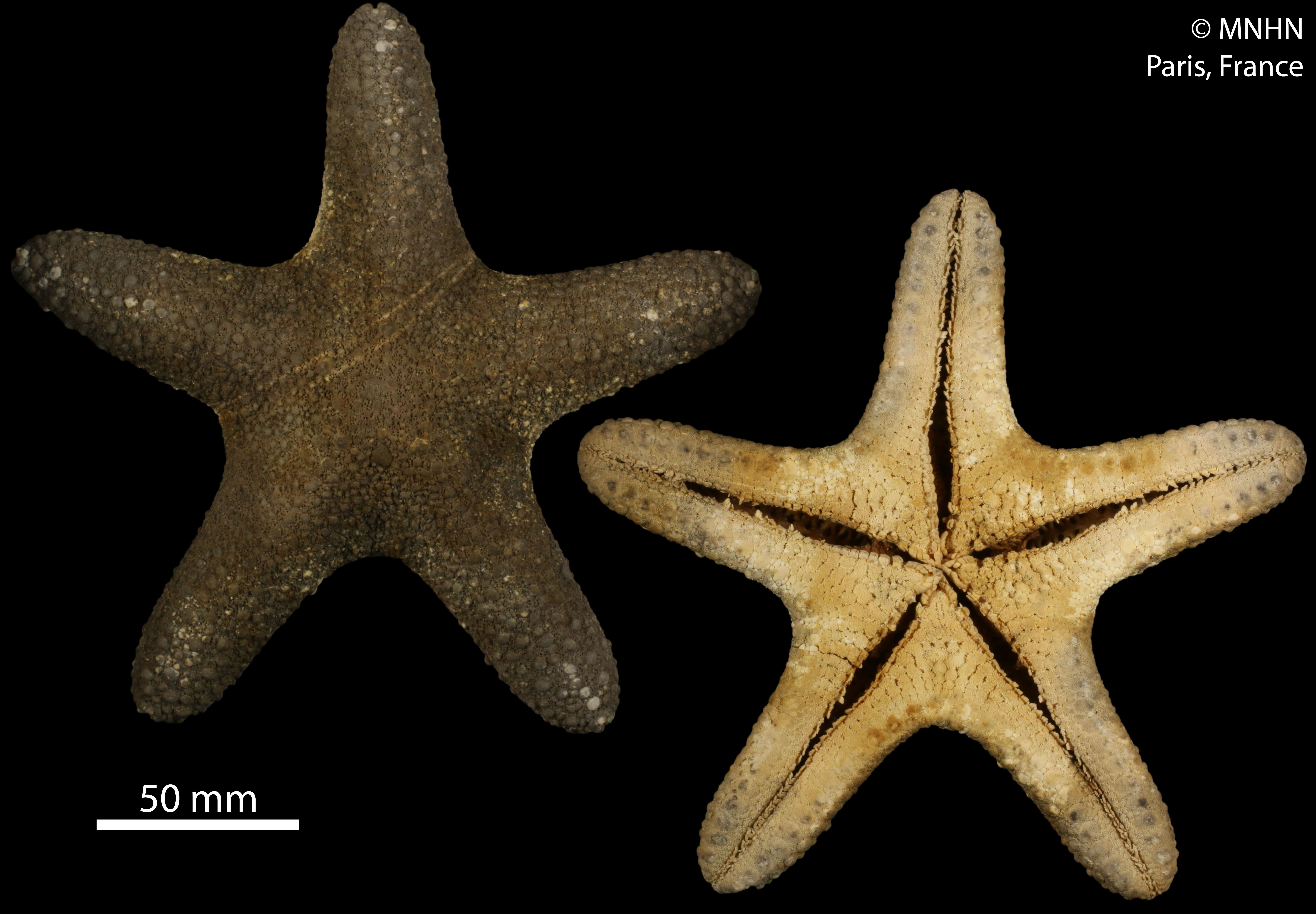 Pentaster obtusatus (Bory de St. Vincent, 1827)Spécimen MNHN-IE-2014-563Collection : Échinodermes (IE)Muséum National d'Histoire Naturelle (Paris, France) Origine : Libellé du pays : OCEAN INDIEN Océan : Indien